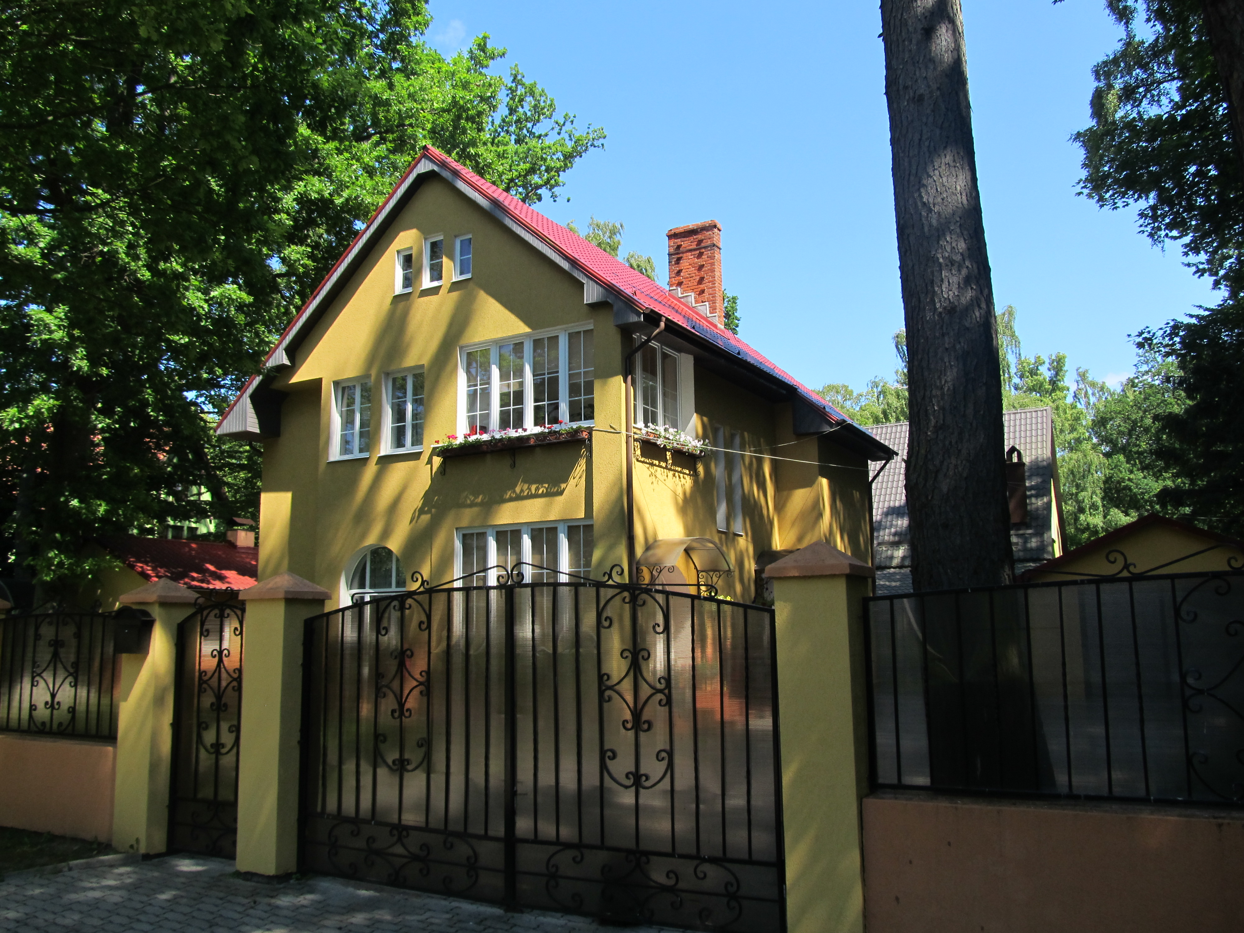 Вилла-пансион «Цецилия», ныне частный дом №3 на проспекте Победы (2015 год), Отрадное (Калининградская область)